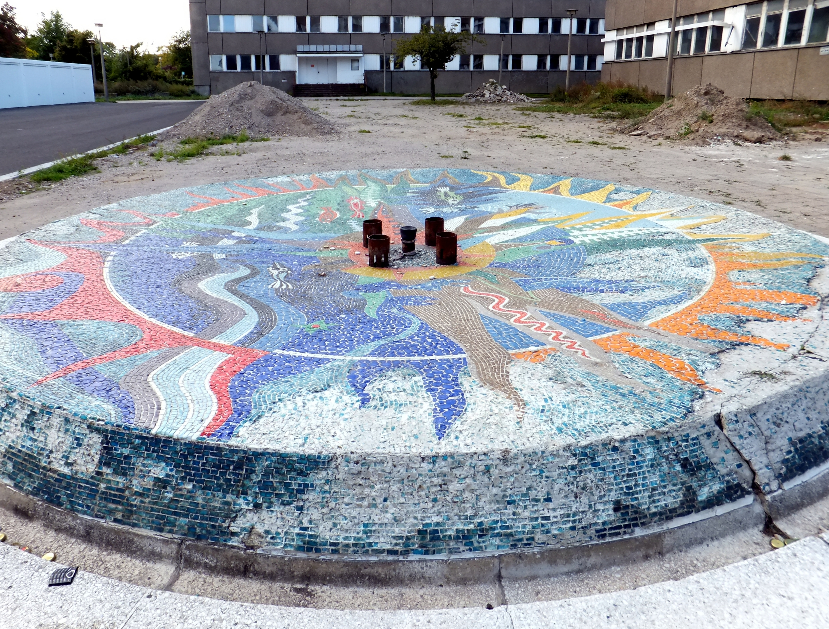 Mosaikbrunnen auf einem Gelände an der Siegfriedstraße